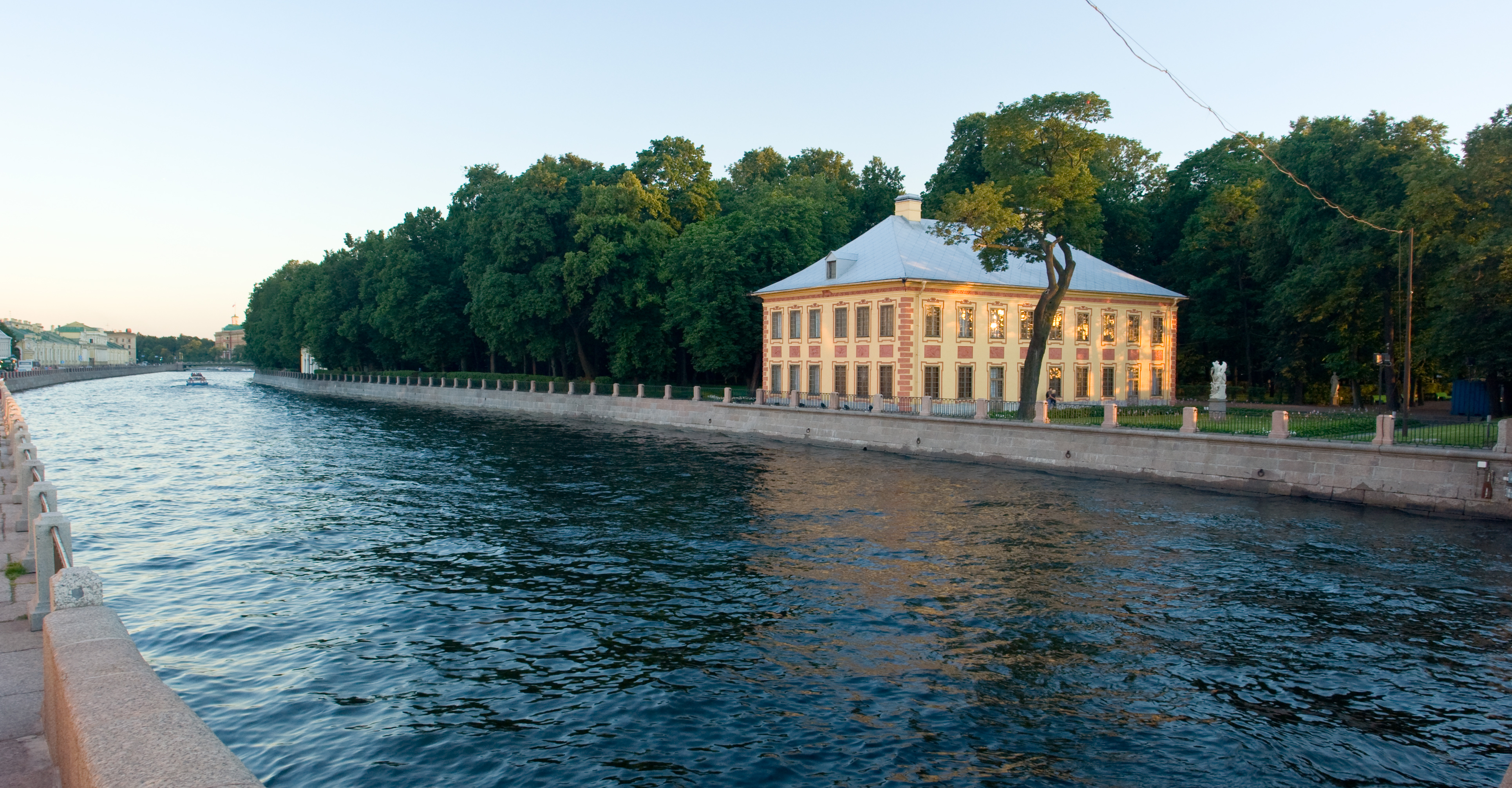 Вид на Летний сад с Прачечного моста. (Фонтанка, Летний сад, на заднем плане купол Михайловского замка)